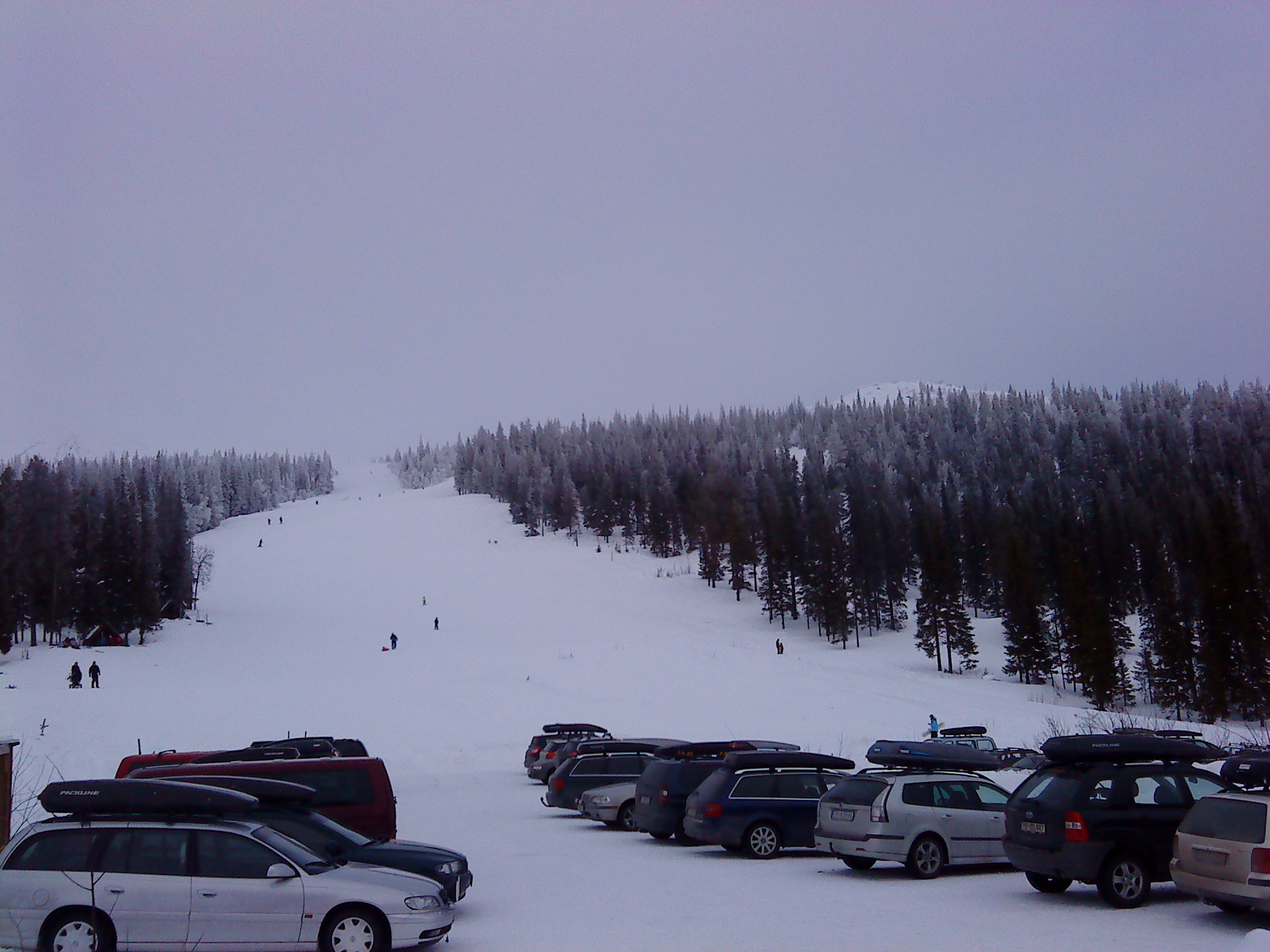 Galtis